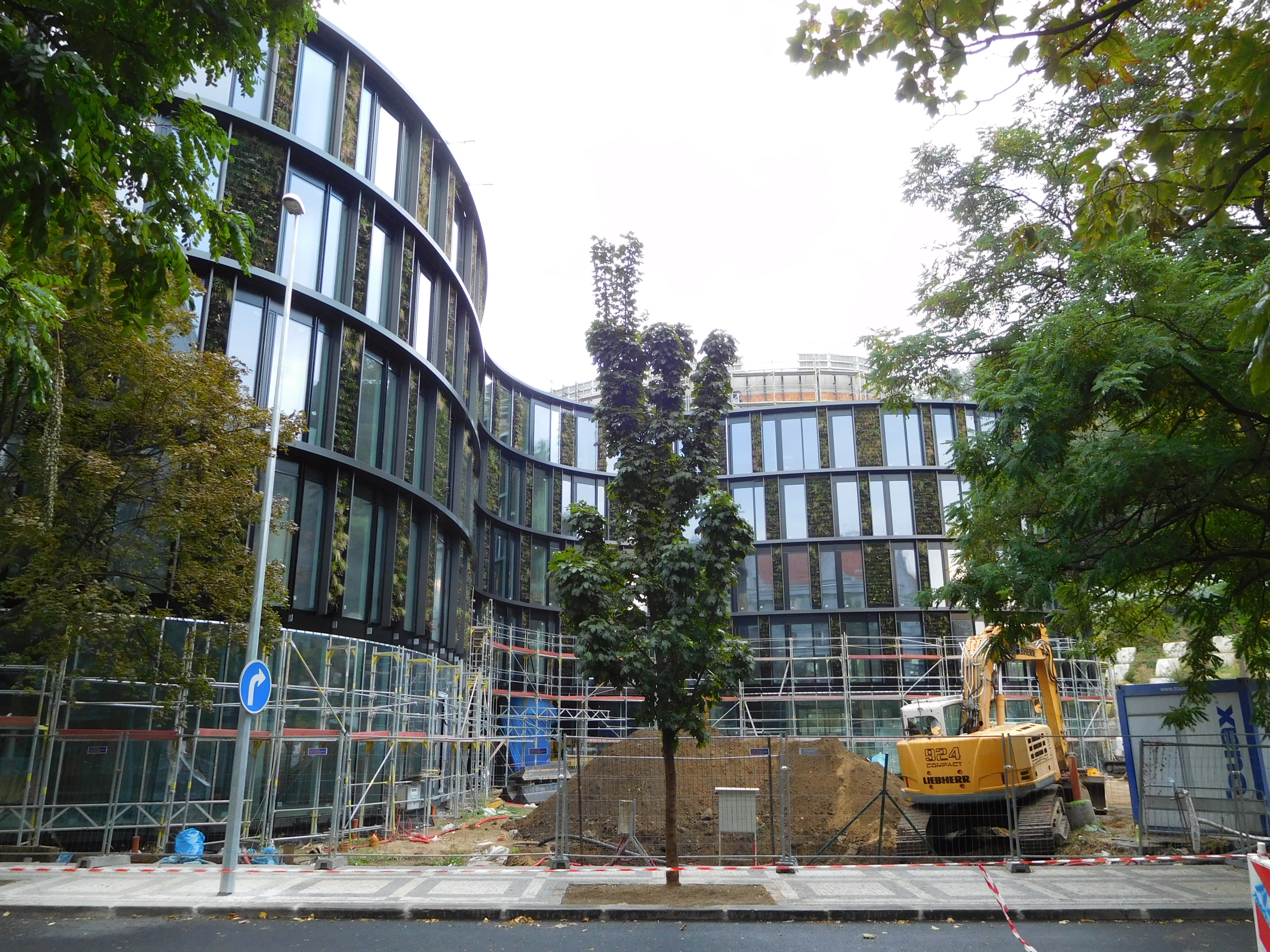 Butterfly Karlín - stavba; Praha - Karlín, Pernerova; pohled z Pernerovy